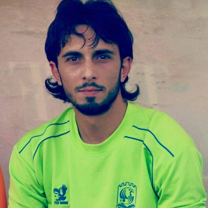 صورة شخصية للاعب الخلوق مهند ابراهيم